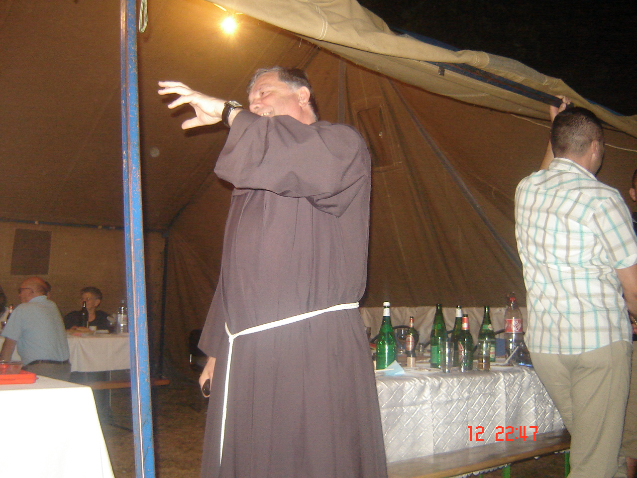 Fra Franjo Mabić,trenutni župnik župe Izbično